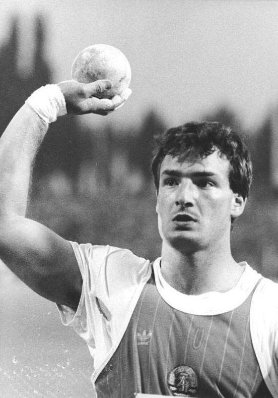 Ulf Timmermann ADN-ZB Koard 22.5.88 Griechenland: Neuer Weltrekord im Kugelstoßen durch DDR-Sportler-Der Berliner Ulf Timmermann stellte bei internationalen Leichtathletikwettbewerben in Chania auf Kreta im zweiten Versuch mit 23,86 m einen Weltrekord im Kugelstoßen auf. (Foto von früherem Termin)